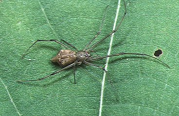 female Moneta tanikawai from Okinawa.